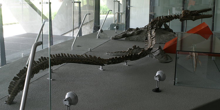 Maashagedis (complete skeleton) Mosasaurus, compleet skelet